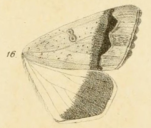 Ophiusa dianaris